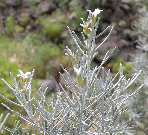 Detalle de las hojas de la Parolinia platypetala